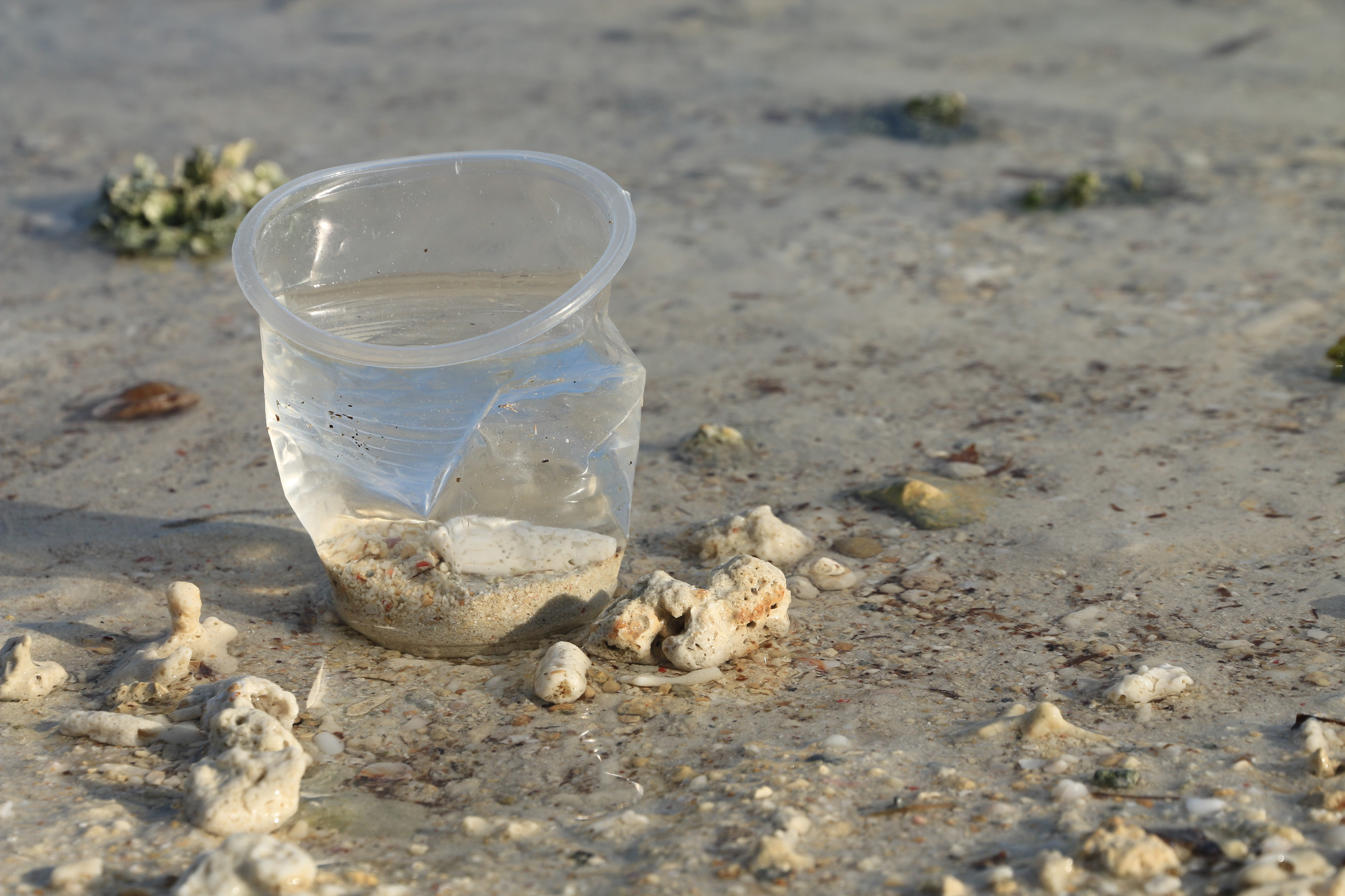 even screwed